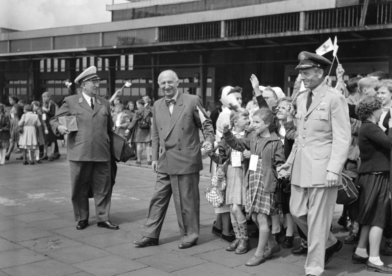 Kinder-Lift, 6. Juli 1955 Rund 1800 Kinder aus Berlin wurden mit amerikanischen Militärmaschinen zu ihren Ferieneltern in die Bundesrepublik abgeflogen.